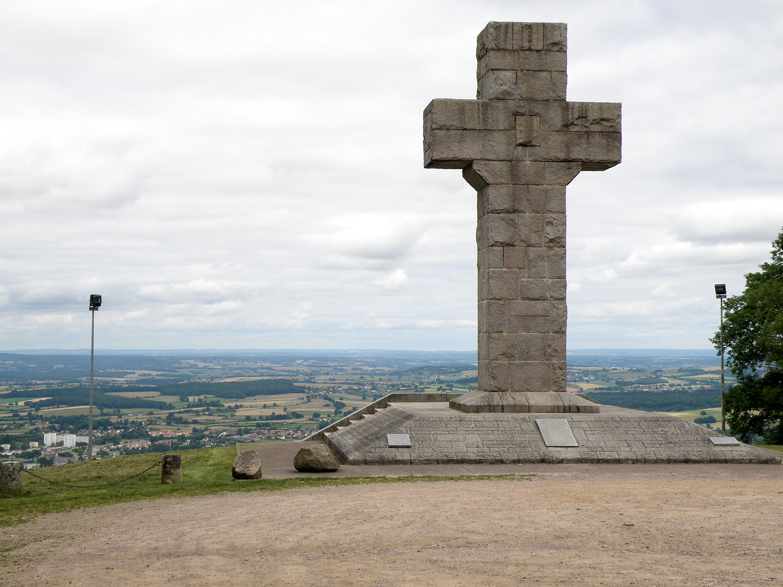 Autun (Saône-et-Loire, Bourgogne, France). Croix de la Libération, sur la montagne Saint-Sébastien.